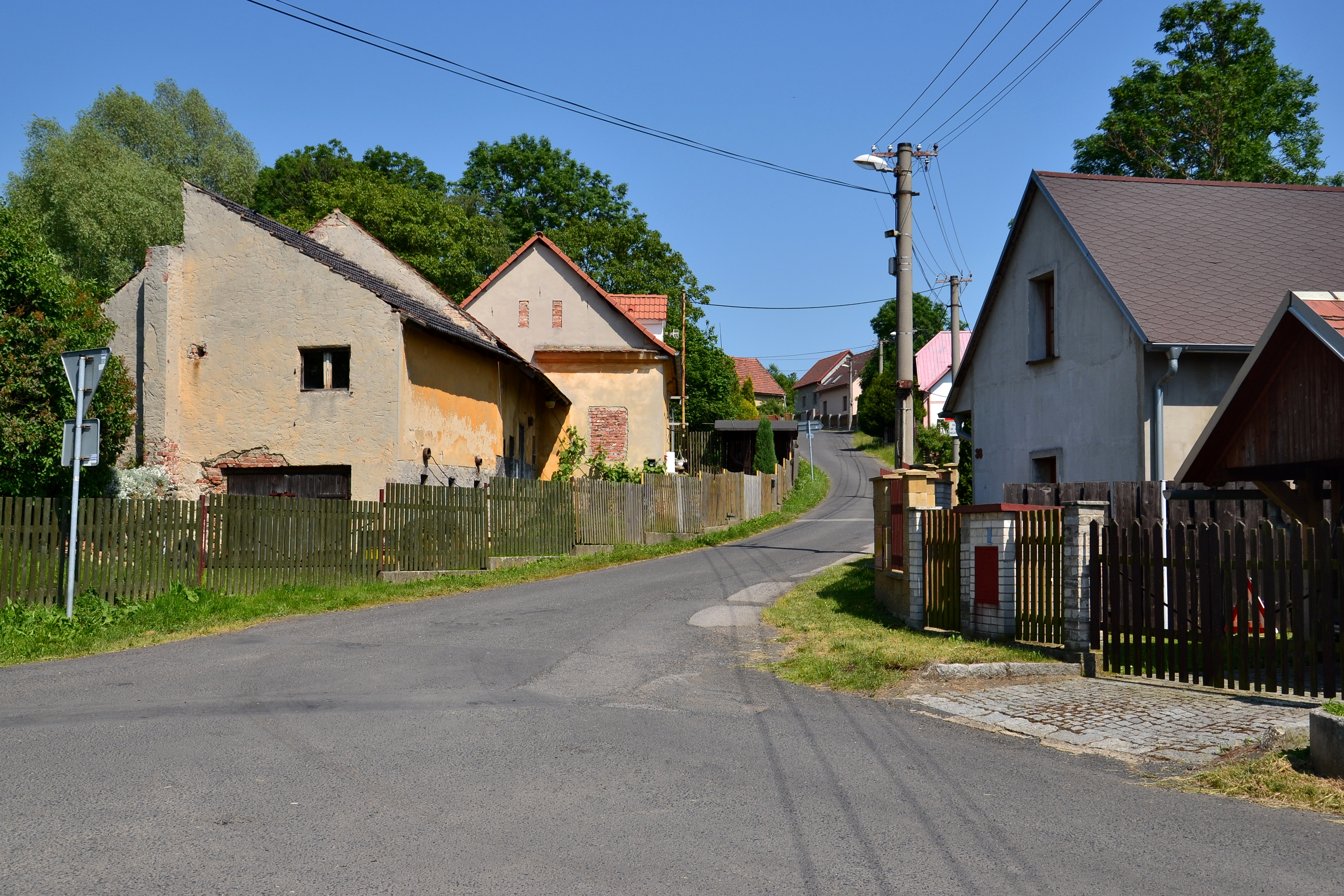 Střední část vesnice